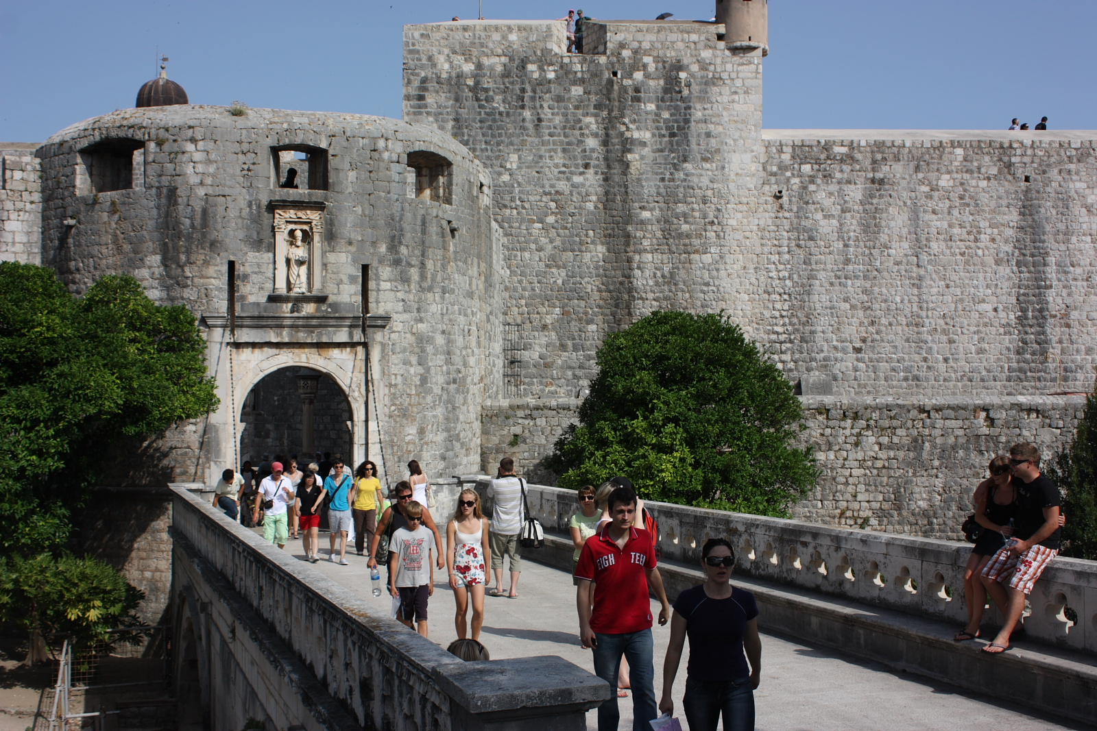 Dubrovnik